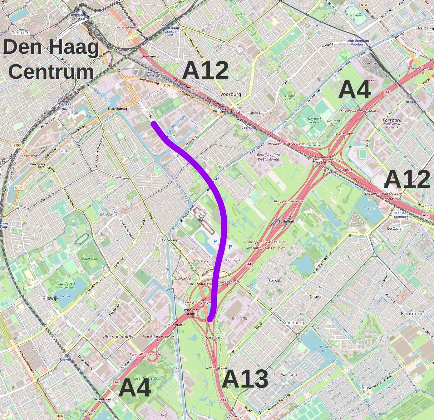 Rotterdamsebaan, Den Haag